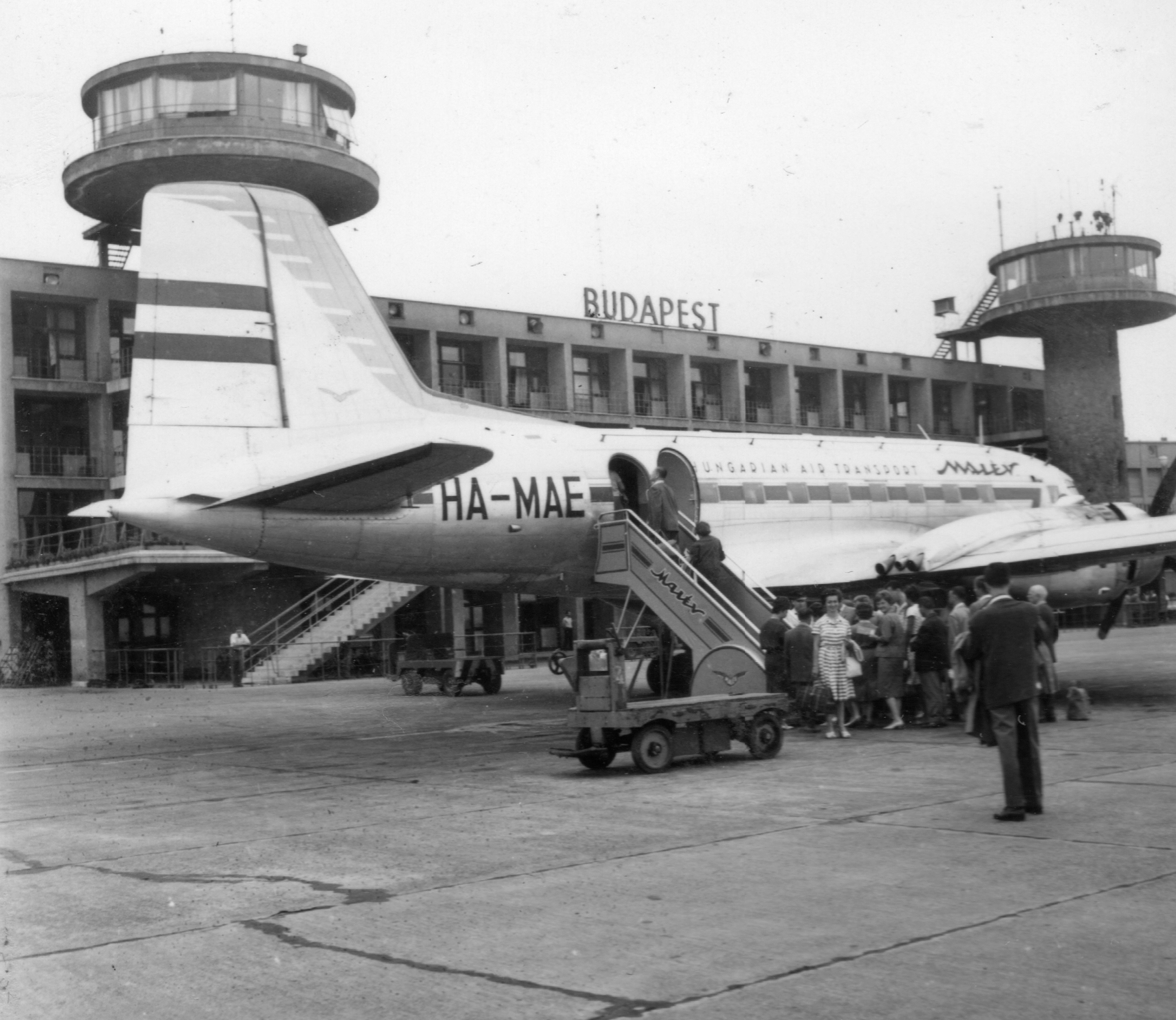 MALÉV Iljusin IL-14 utasszállító repülőgép. Location: Hungary, Budapest XVIII. Tags: airplane, airport, transport, Hungarian Airlines, Soviet brand, Budapest Title: MALÉV Iljusin IL-14 utasszállító repülőgép.